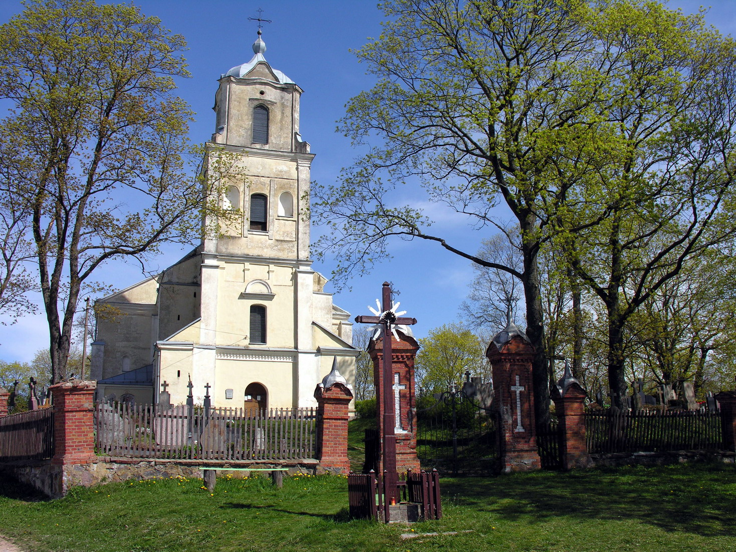 Apytalaukio bažnyčia